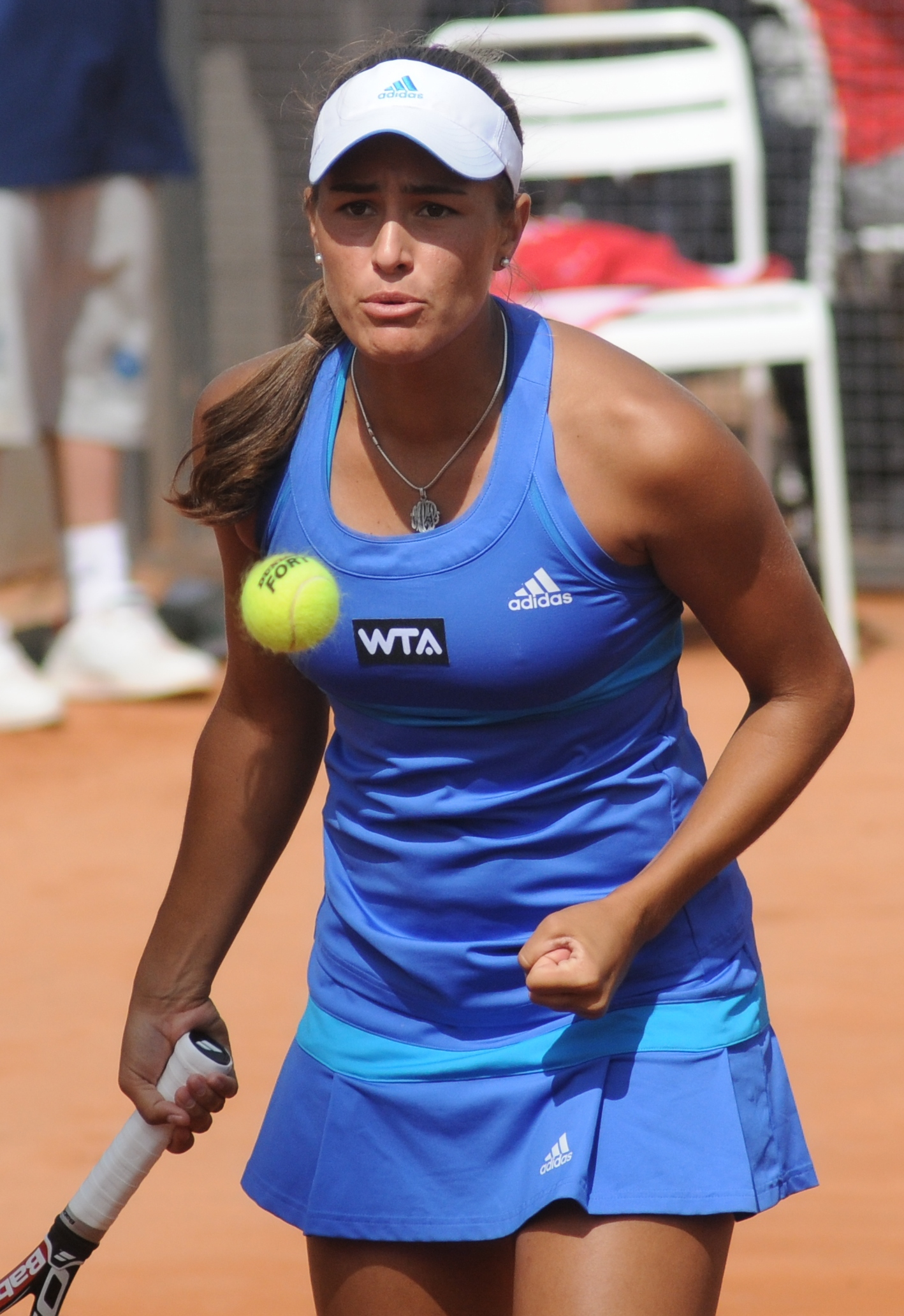 Mónica Puig at the 2014 Internazionali BNL d'Italia